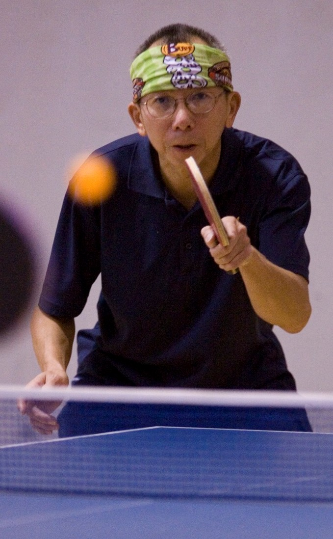 Yau-Man Chan